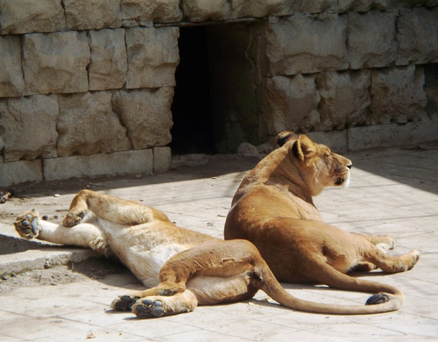 африканские львы в бакинском зоопарке